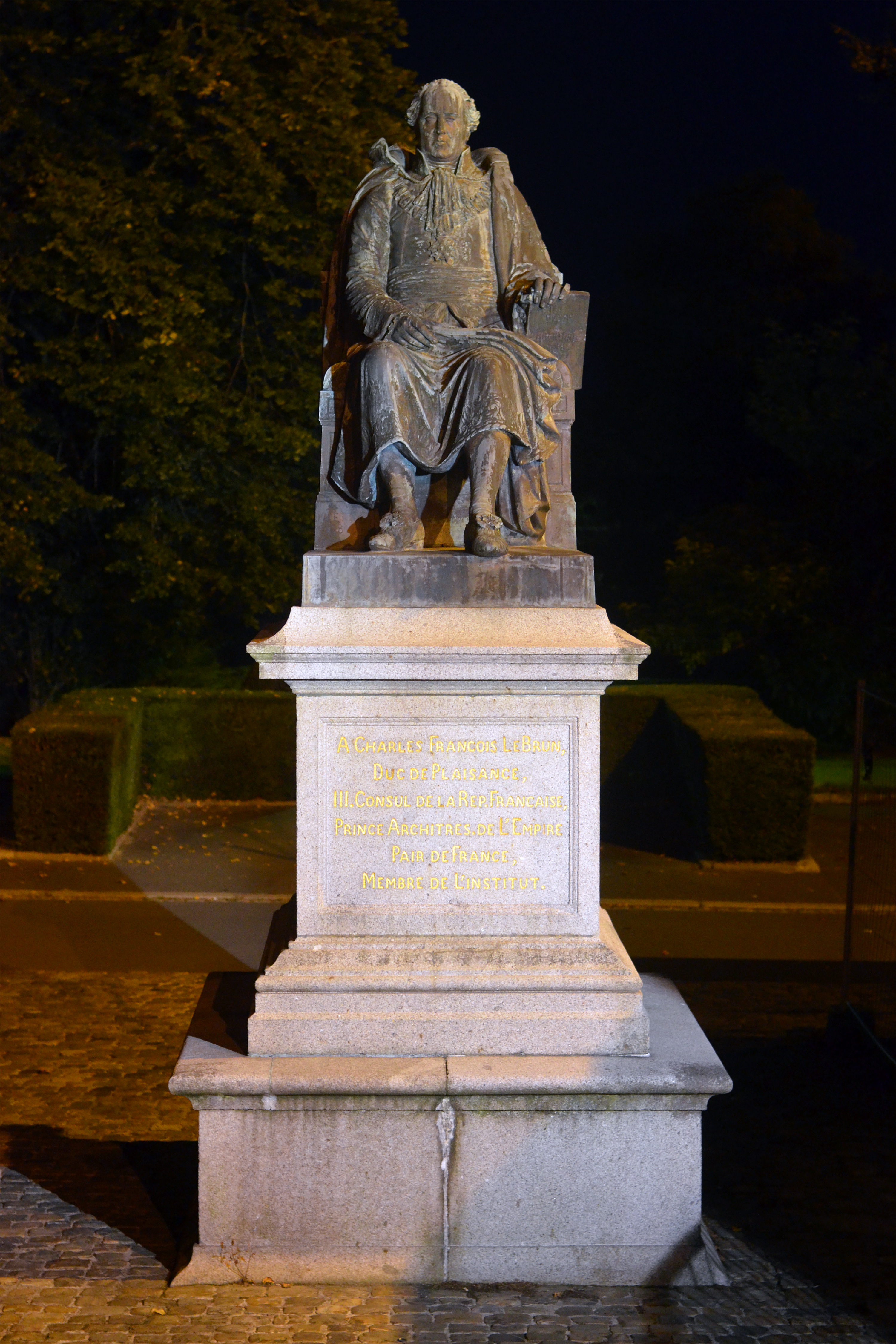 Statue de Charles-François Lebrun à Coutances sculptée en 1846 par Antoine Etex.